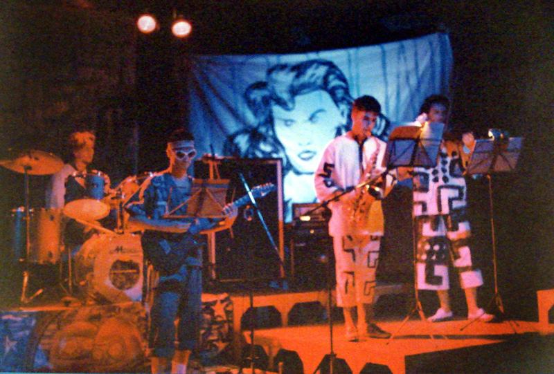 Show Mim Notauro, Você Jane, da banda Aristóteles de Ananias Jr. Casa de Cultura Mario Quintana, Porto Alegre, 1991. Da esquerda para a direita: Alexandre Birck, Marcelo Birck, Luciano Zanatta e Ricardo Frantz.